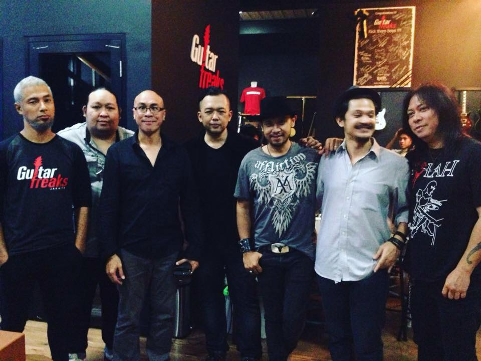 Formasi GETAH di tahun 2016 dengan drummer Jimbo dan Marcell.